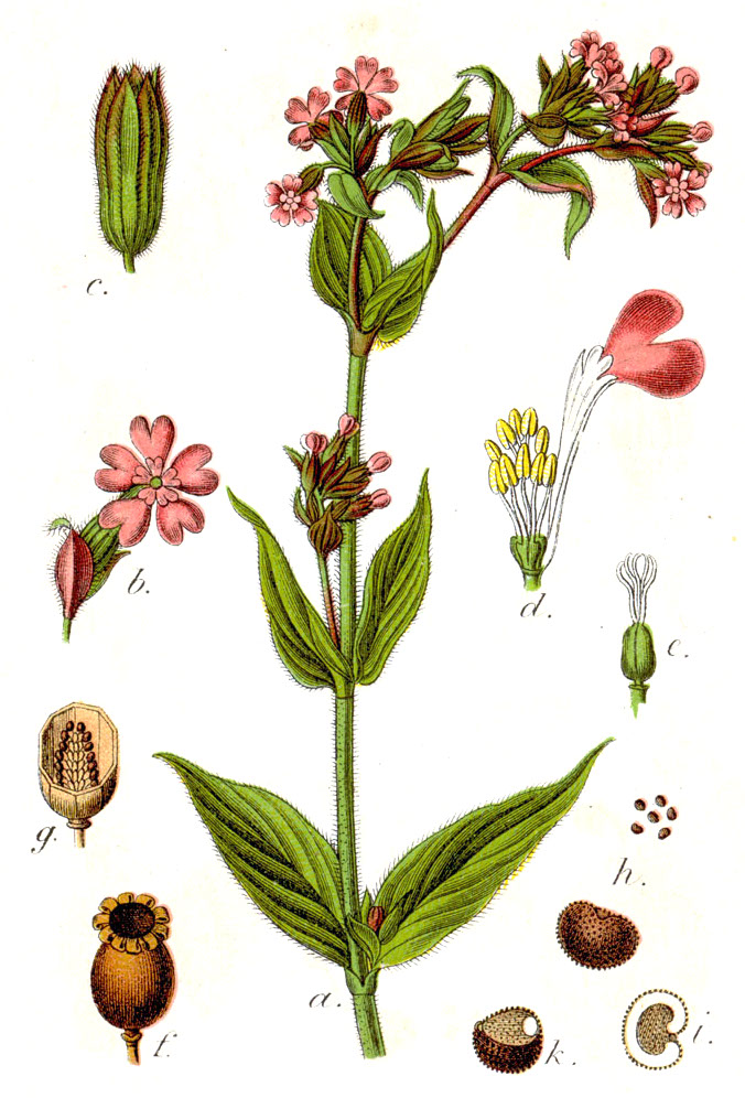 Silene dioica (L.) Clairv., syn. Lychnis dioica var. rubra Weigel, Melandrium sylvestre Nyman, Silene rubra E.H.L.Krause Original Caption Rotes Liedweich, Silene rubra